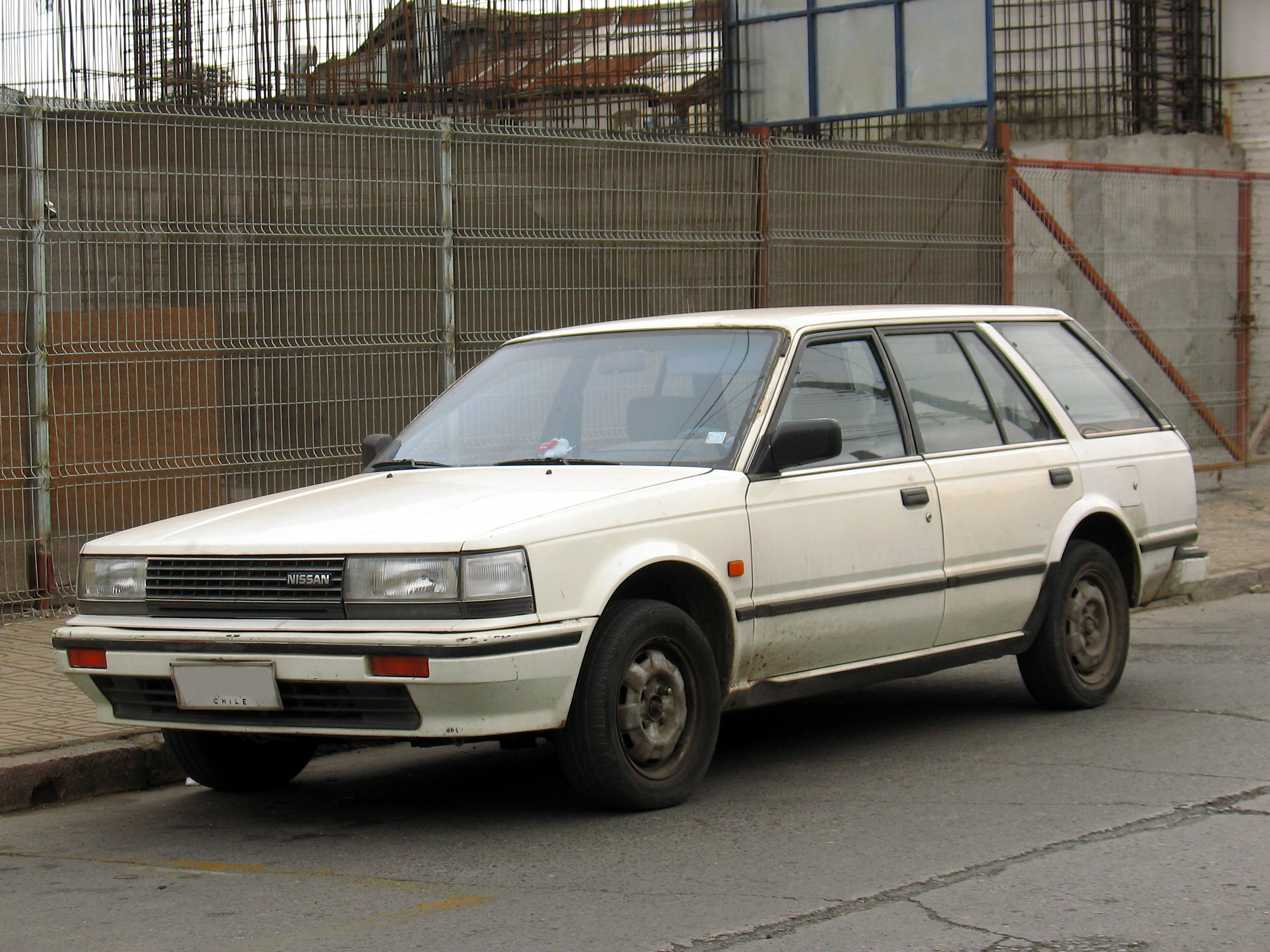 Nissan Bluebird 1.8 GL Wagon 1989